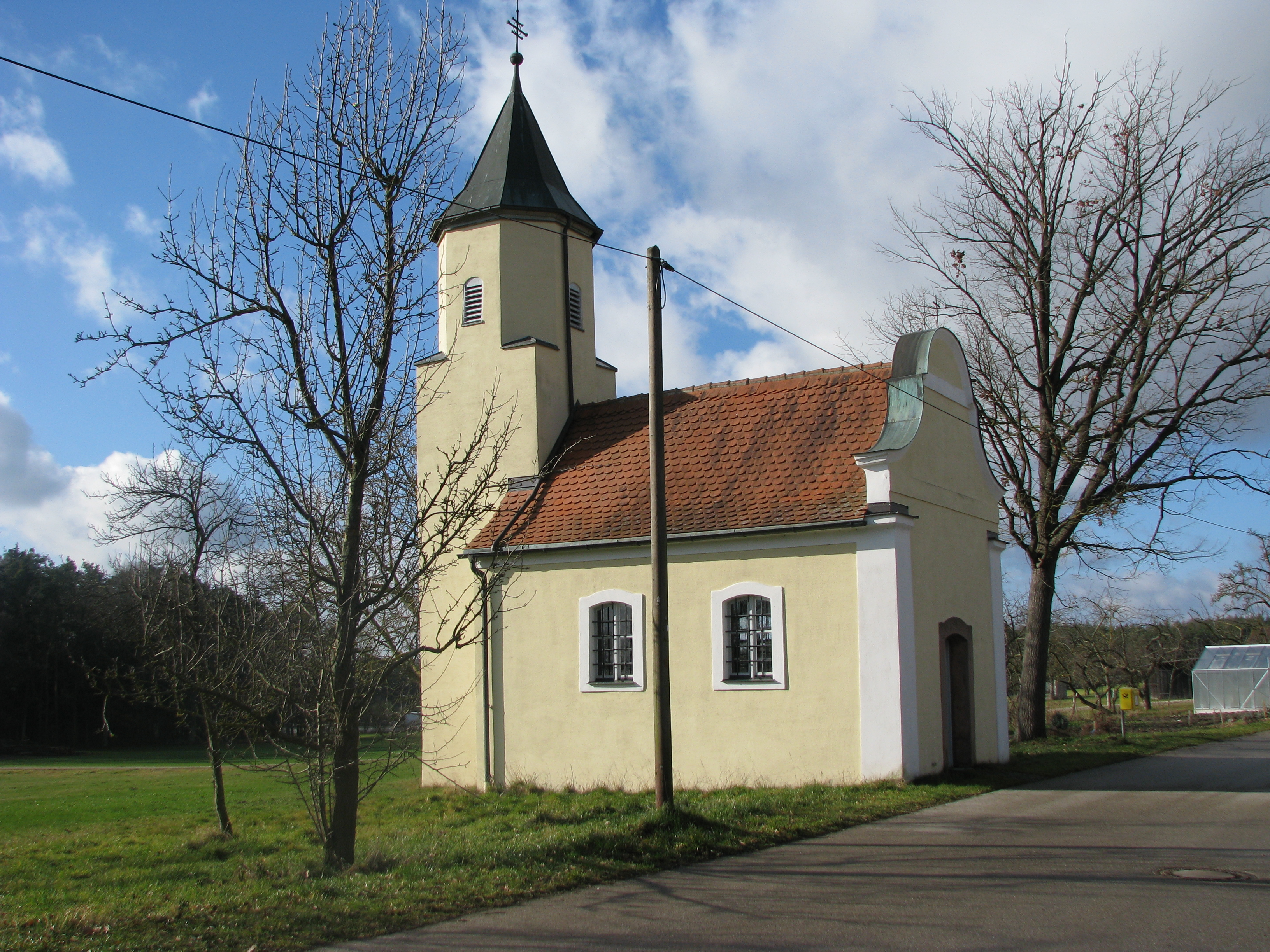 Bischofsholz, Ortsteil von Hilpoltstein im mittelfränkischen Landkreis Roth, Katholische Ortskapelle